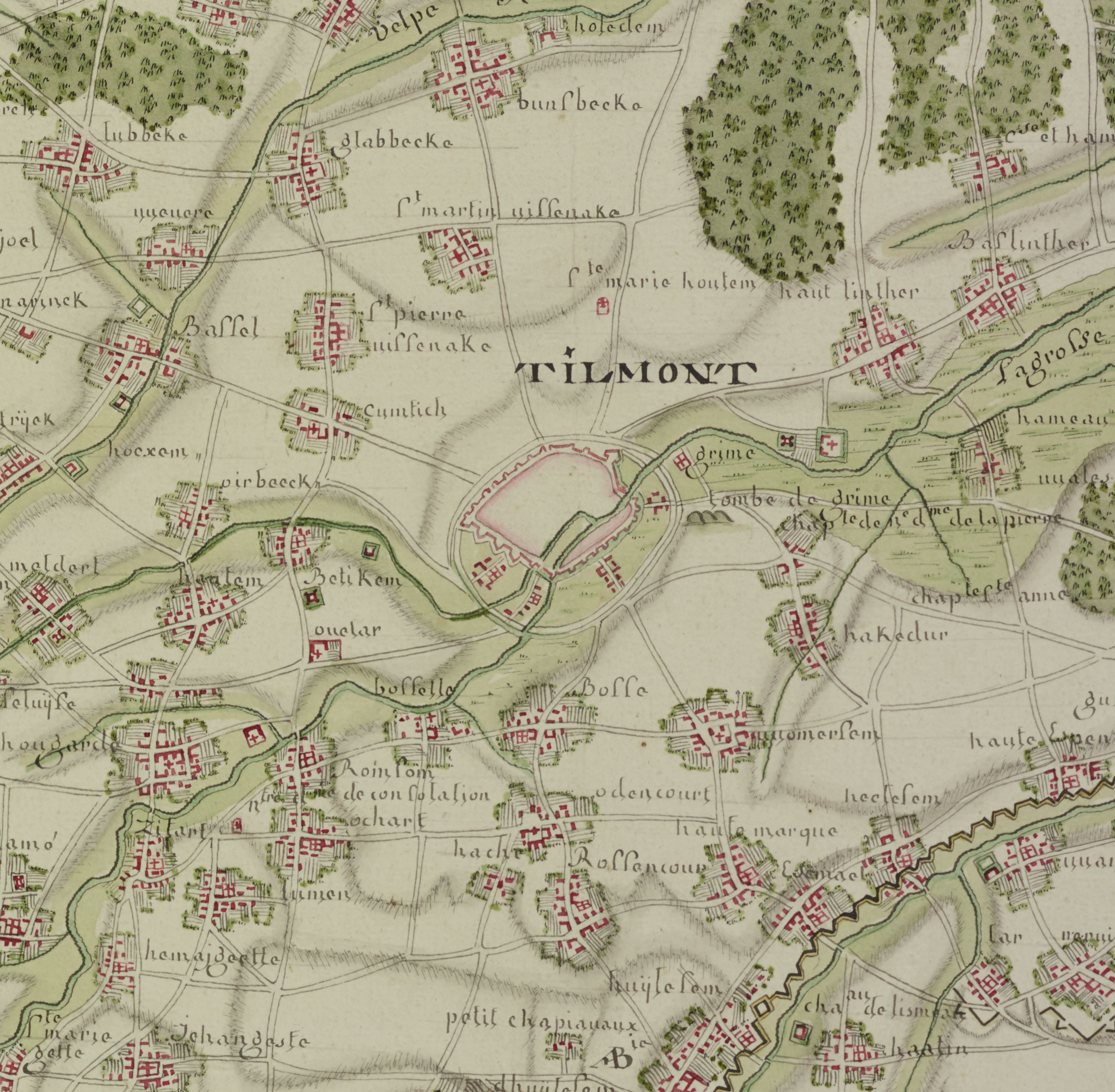 cartes réalisées par Naudin sur Gallica.